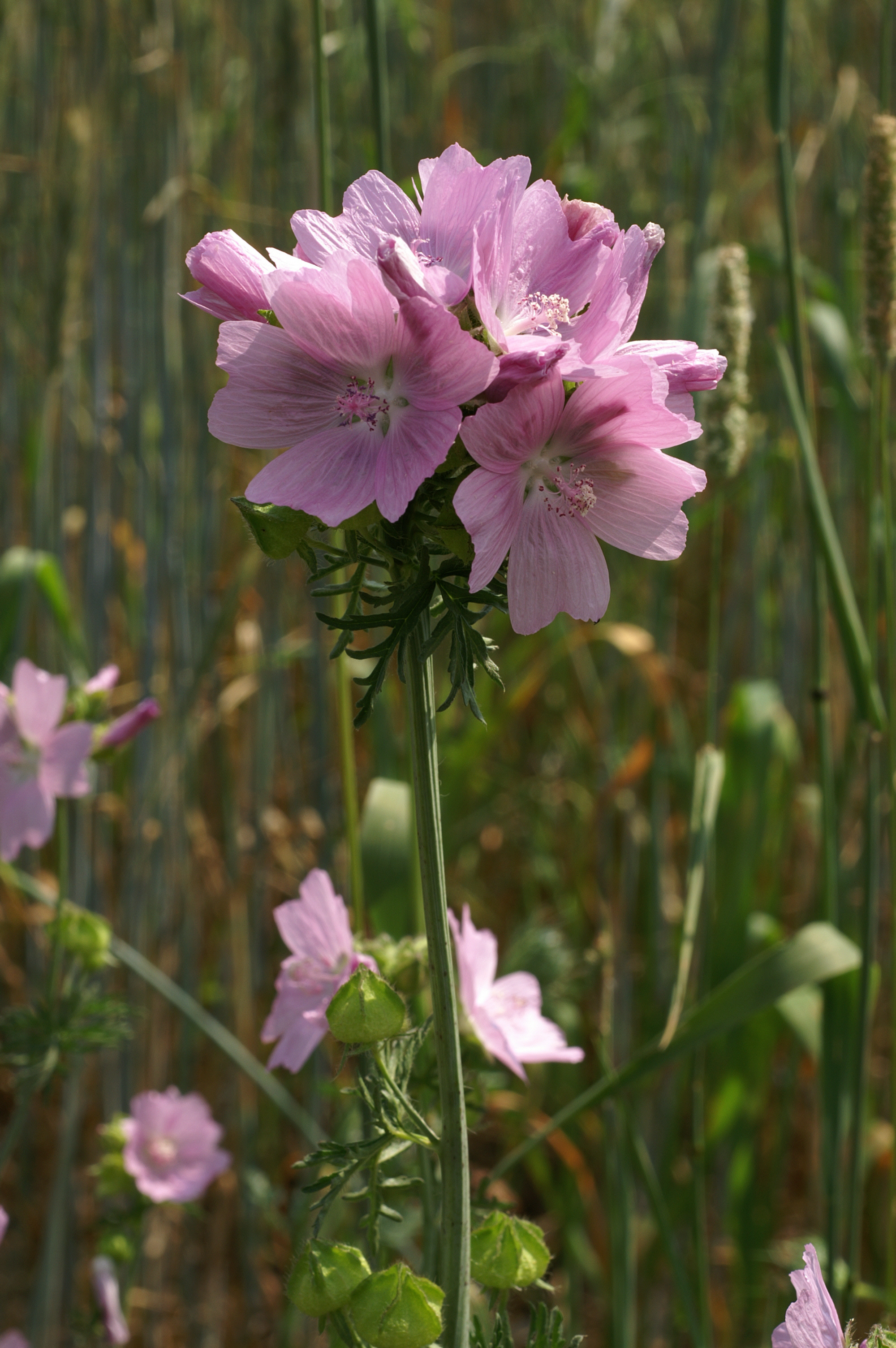 Bildgegenstand: Moschus-Malve (Malva moschata), Blütenstand